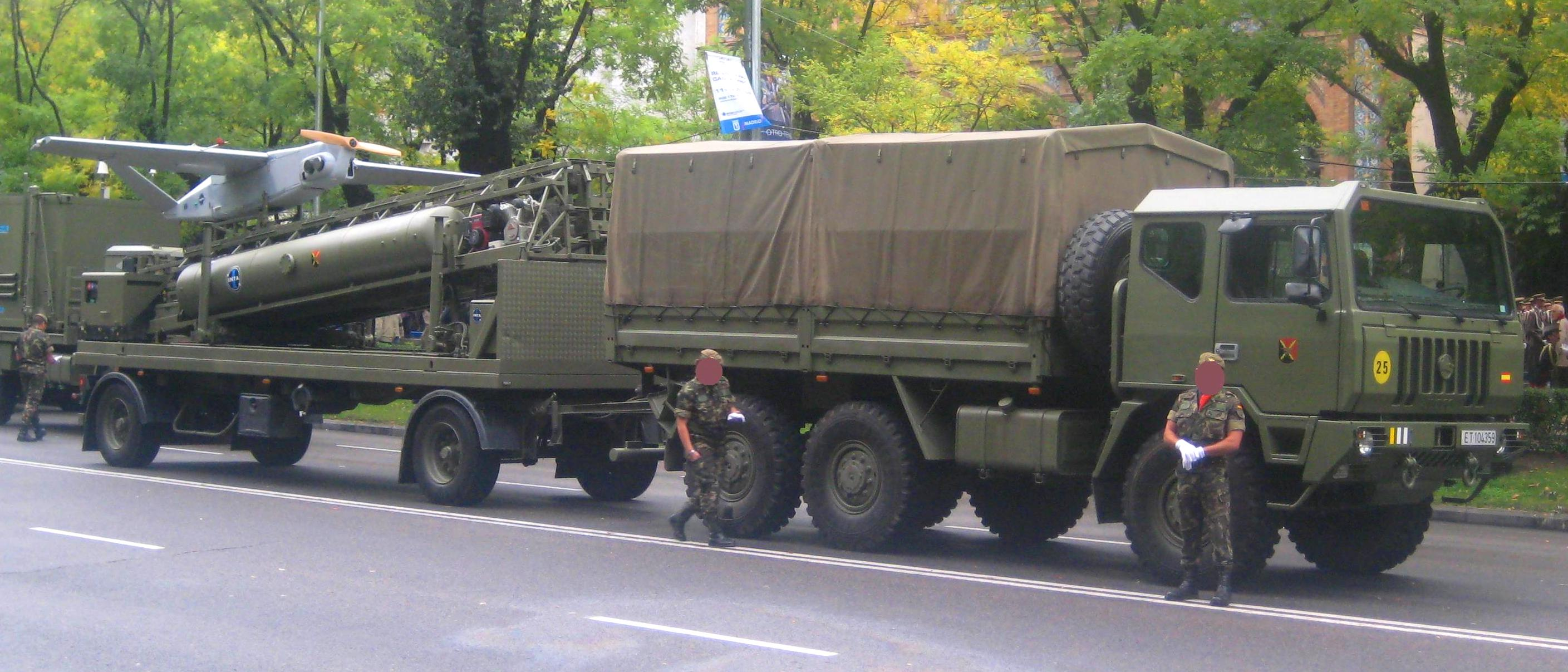 SIVA del E.T. Español.